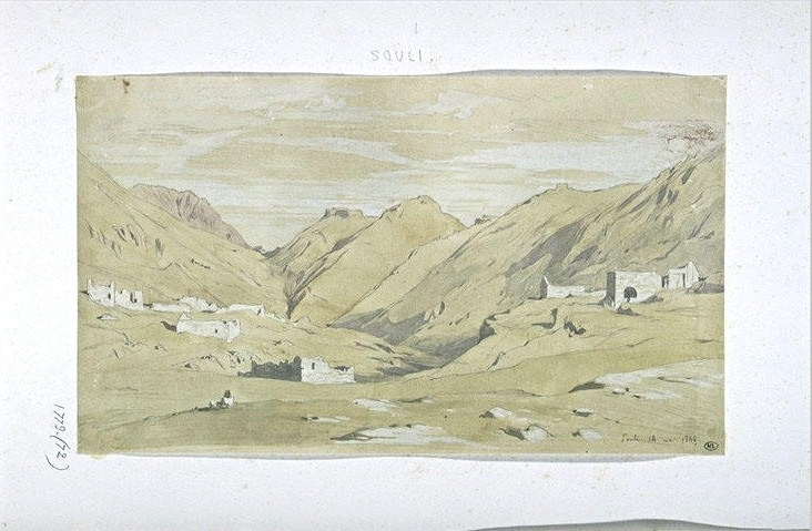 Souli, vue du village et du château de Kiaffa